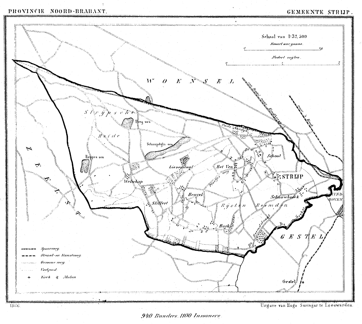 Nederland, Noord-Brabant, Gemeente Strijp